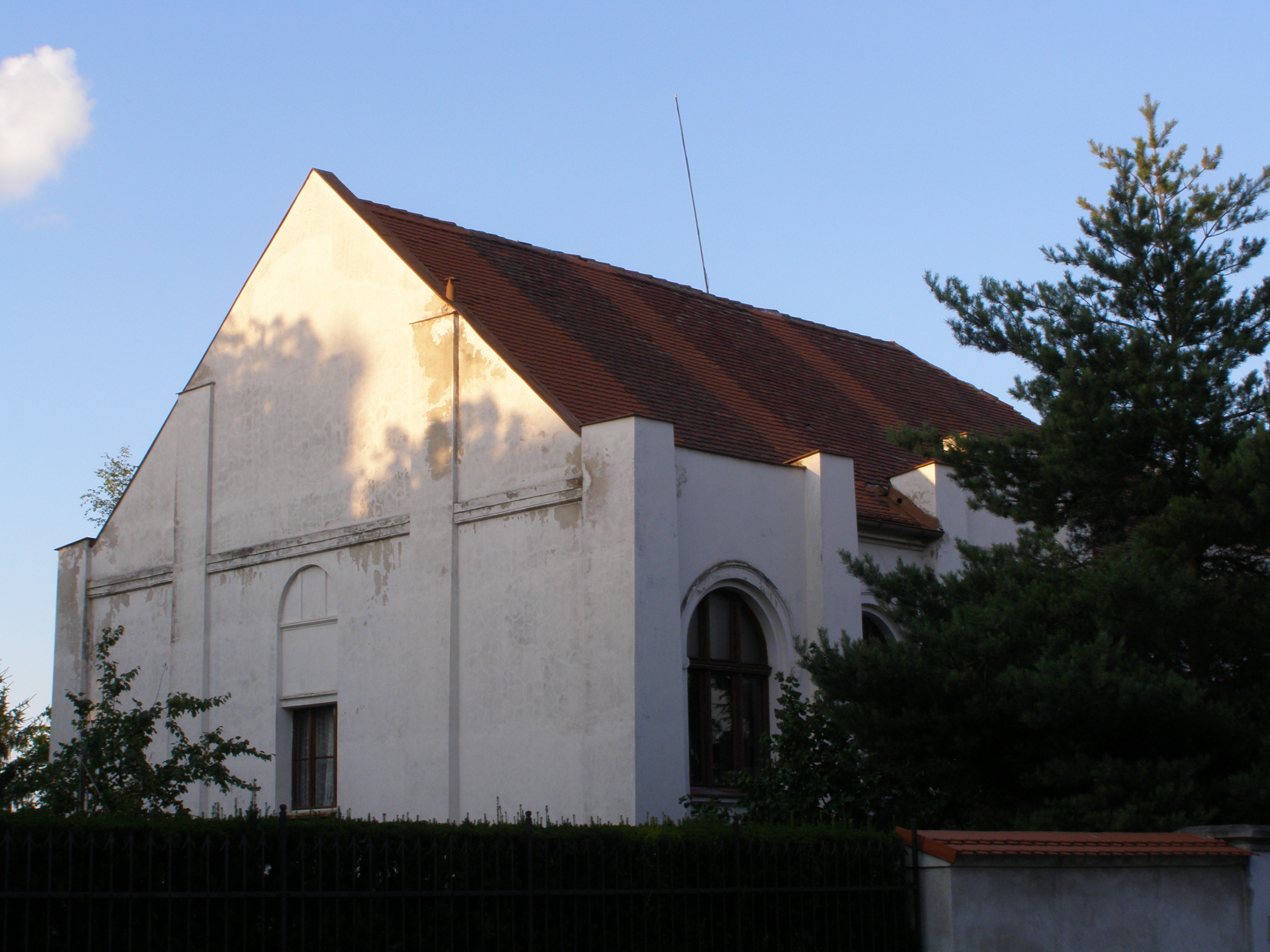 Kutná Hora, část Kutná Hora-Vnitřní Město, ulice Smíškova, budova bývalé synagogy, dnes sbor církve československé husitské